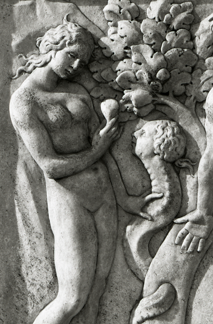 Servizio fotografico : Bologna, 1980 / Paolo Monti. - Strisce: 7, Fotogrammi complessivi: 36 : Negativo b/n, gelatina bromuro d'argento/ pellicola ; 35 mm. - ((Sul portanegativi: N[I]K[MA]T-EL FP4. - Occasione: Documentazione di antichi materiali e metodi di costruzione (operazione diretta dall'Architetto Nicoli). - , presso Archivio Paolo Monti. - Fonte: Fattura di Paolo Monti: IV. Commesse/ Fattura n. 06/ Riprese fotografiche di antichi materiali e metodi di costruzione (operazione diretta dall'Architetto Nicoli) (1980/02/05), presso Archivio Paolo Monti. N. 46 riprese con due copie formato 18x24 pari a n. 92 stampati 18x24. - Fonte: Agenda di Paolo Monti: Nikon Leika 3001-/ Monti 1978 (1978-1982)